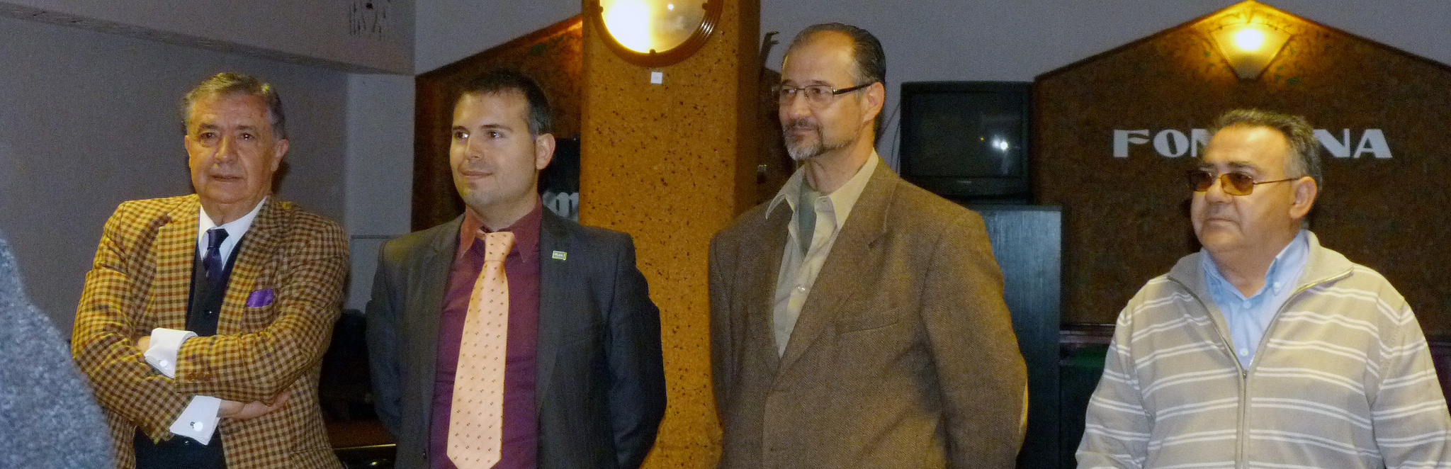 Acto de presentación de la Confederación de Agrupaciones Políticas Independientes (CAPI) en Salamanca